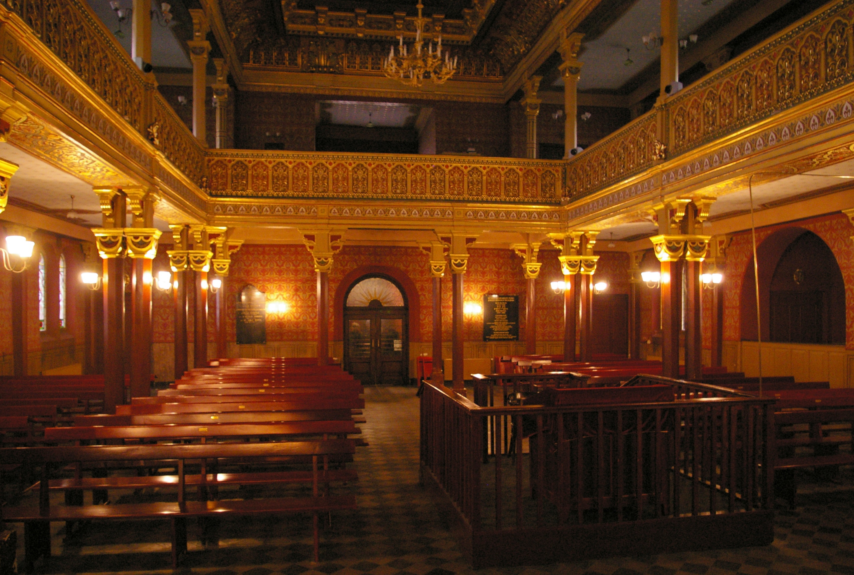 Wnętrze Synagogi Tempel w Krakowie